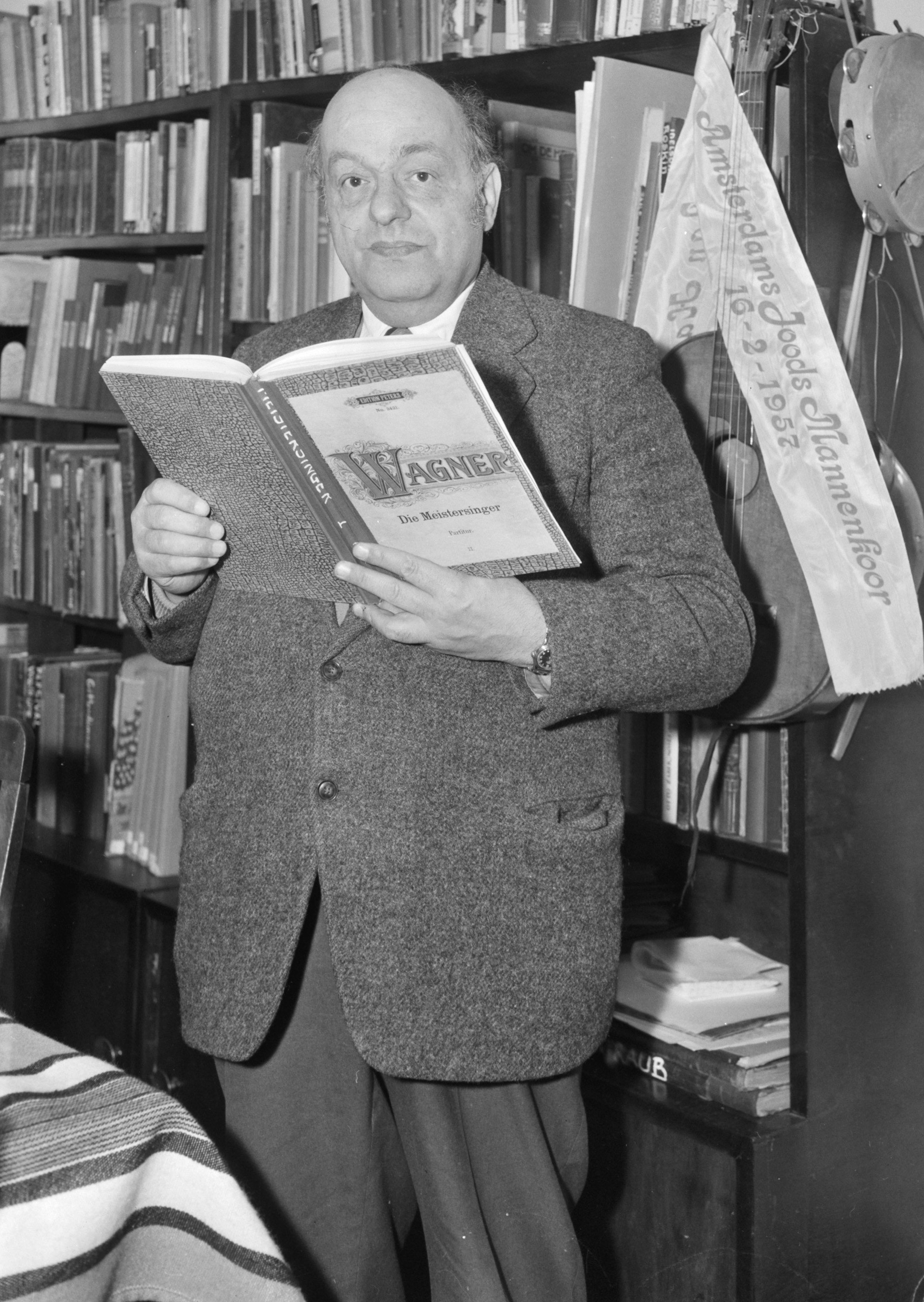 Foto ter gelegenheid van de 60e verjaardag van de dirigent Hans Krieg